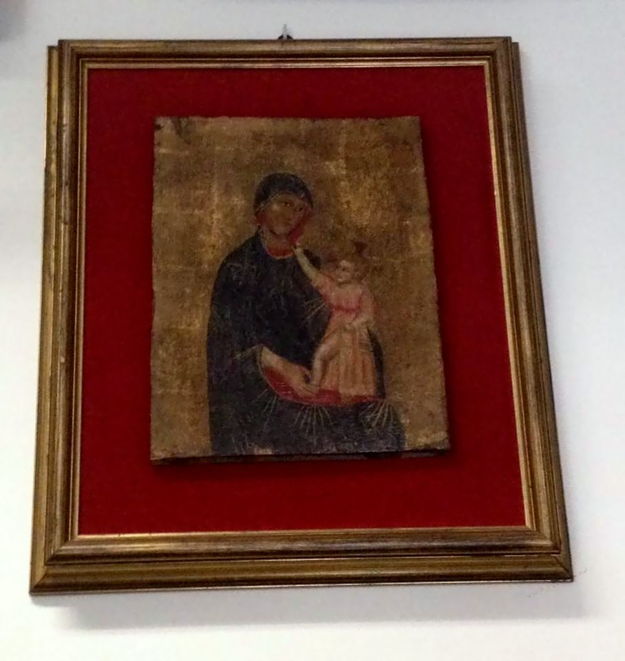 Tempera su tavola di legno